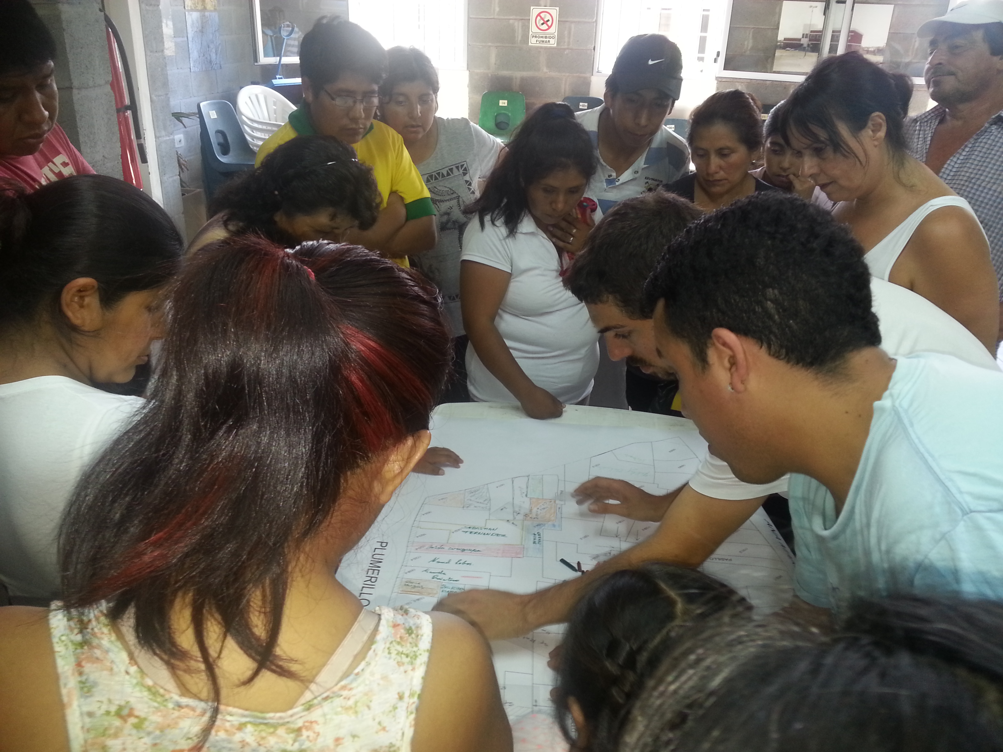 Obras en el barrio Los Piletones, Villa Lugano, Ciudad Autónoma de Buenos Aires.